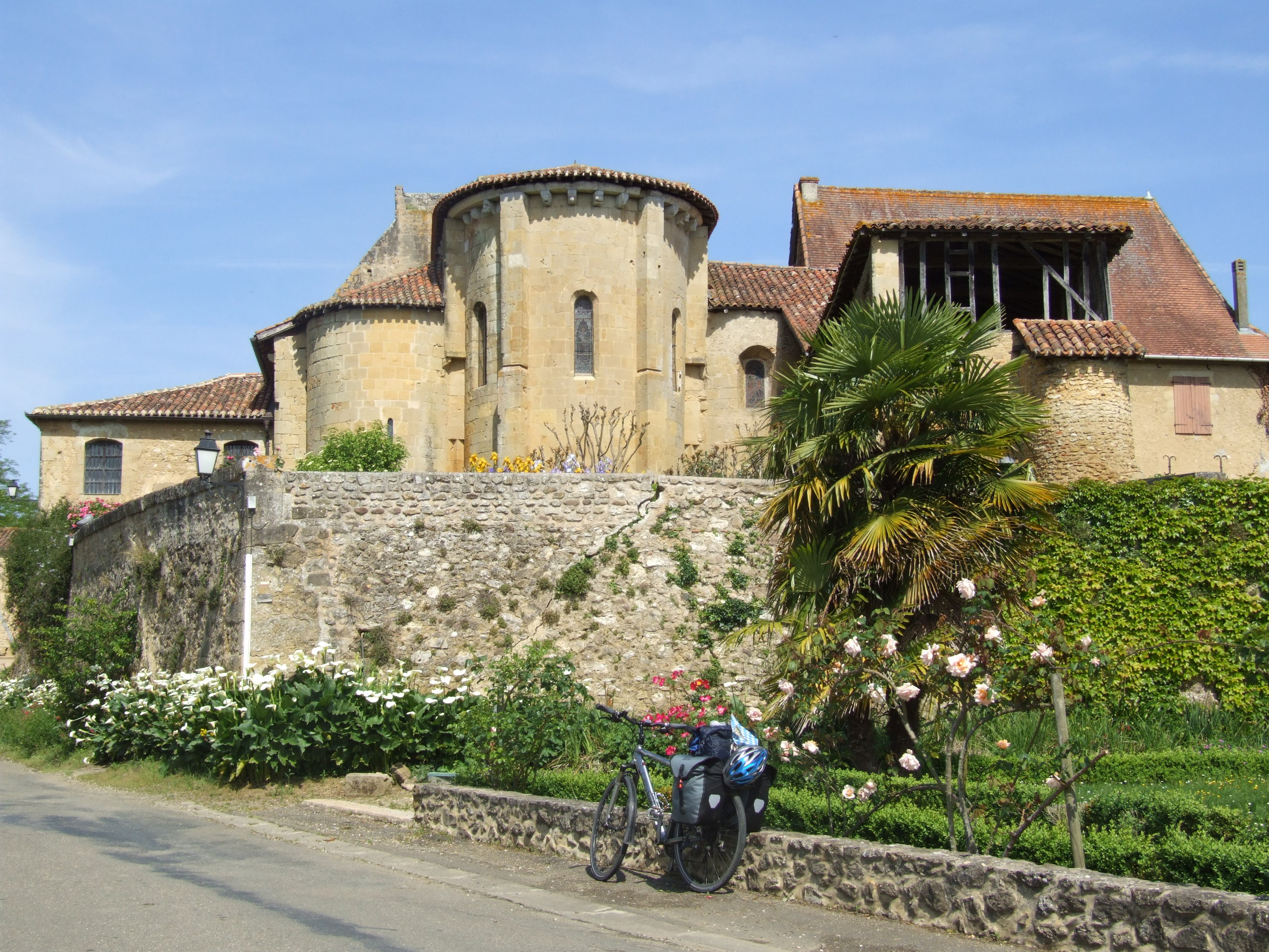 Kirche von Pimbo (fr)